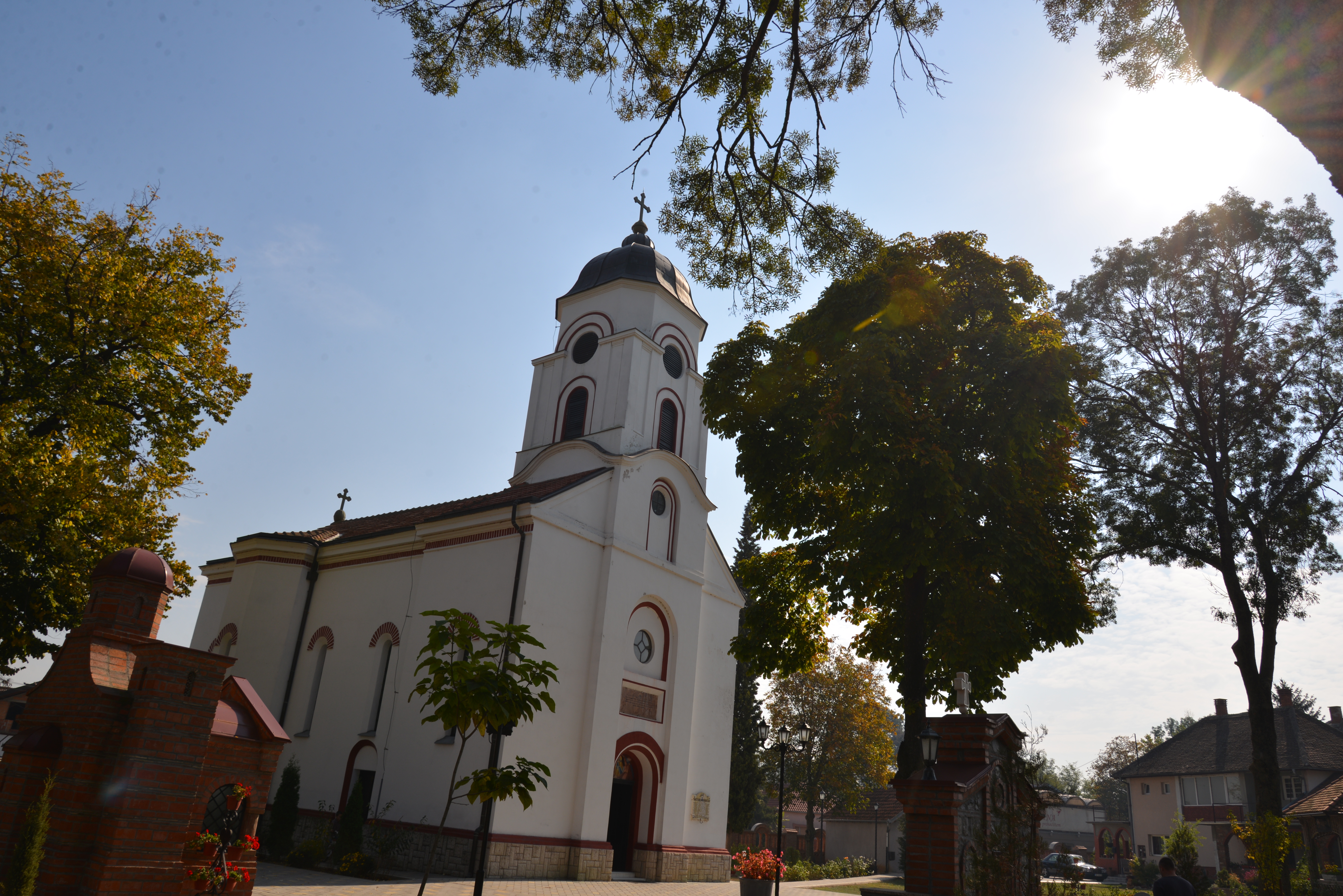 Panorama crkve